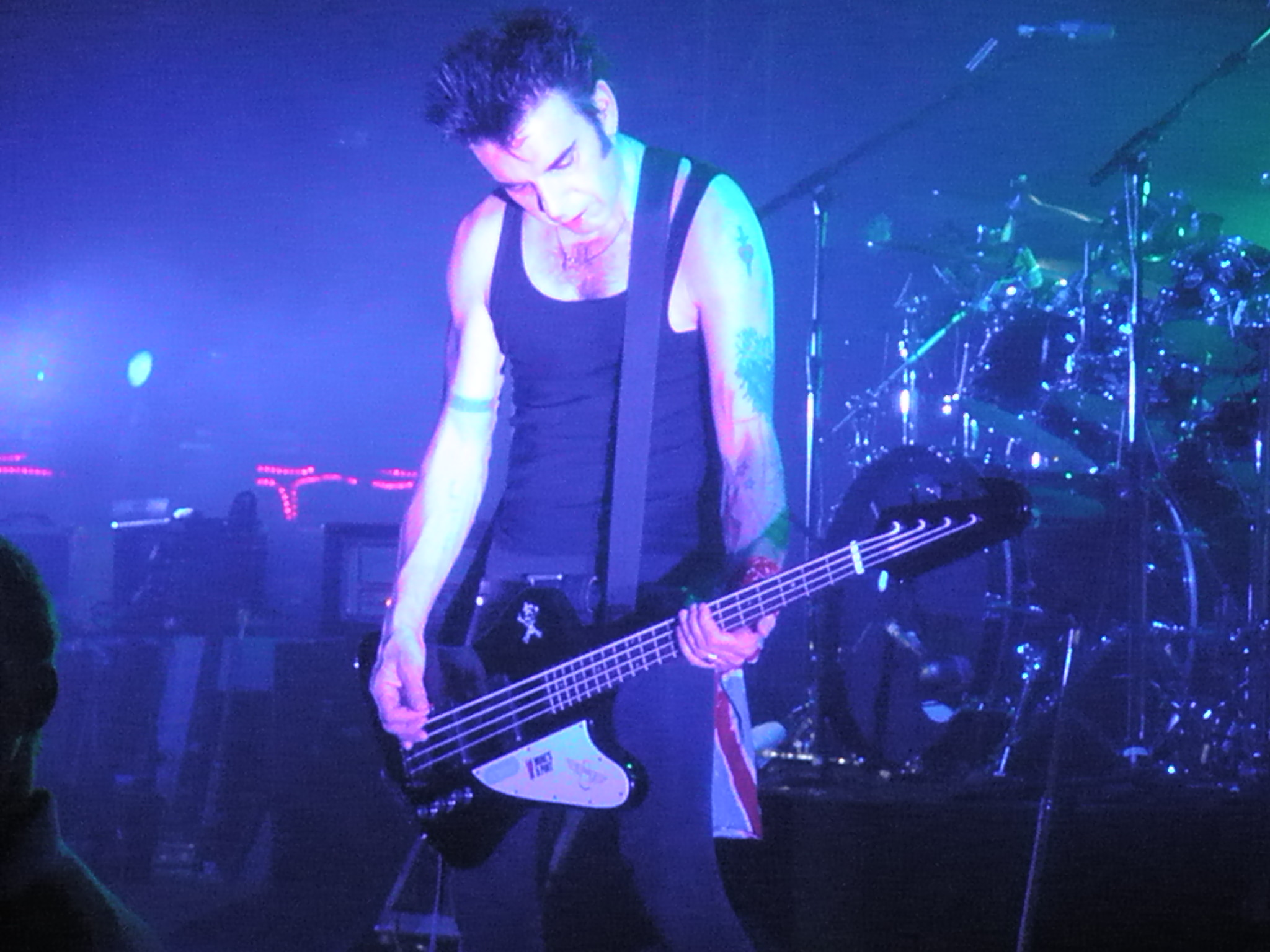 Emiliàn e rumagnòl: Simon Gallup di Cure tòlt śò dal viṿ in dal Śugn dal 2008